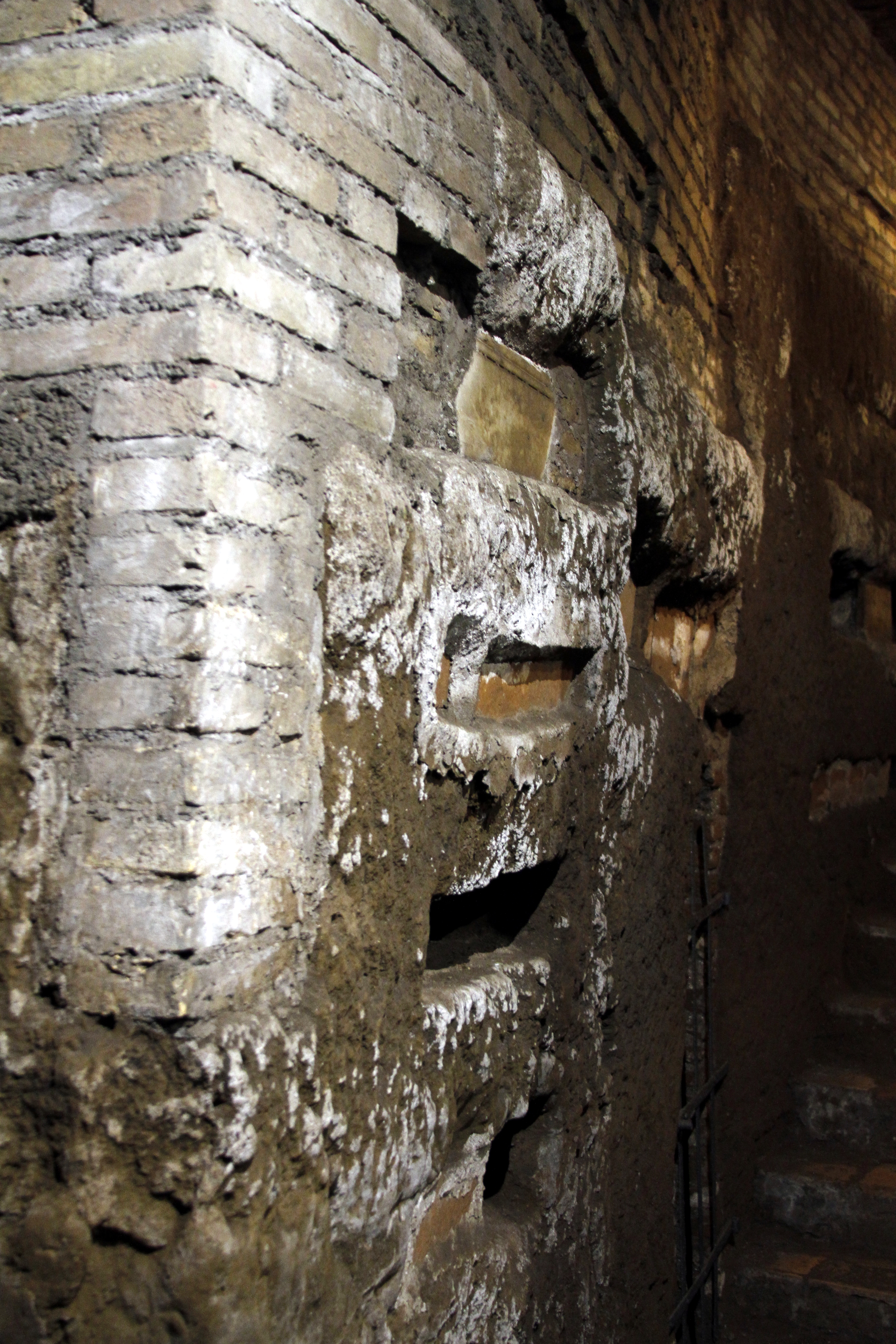 Catacombs of Domitilla - Rome